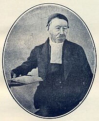 Eerw. Erasmus Smit, eerste predikant van die Voortrekkers